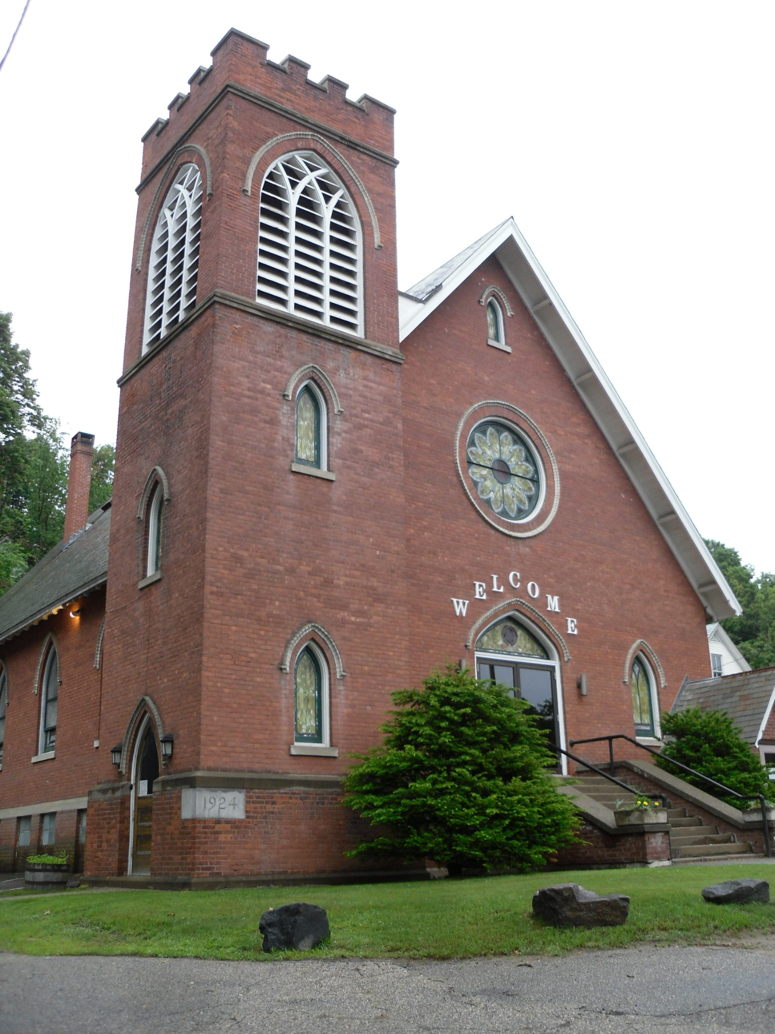 Church, Springfield, Vermont